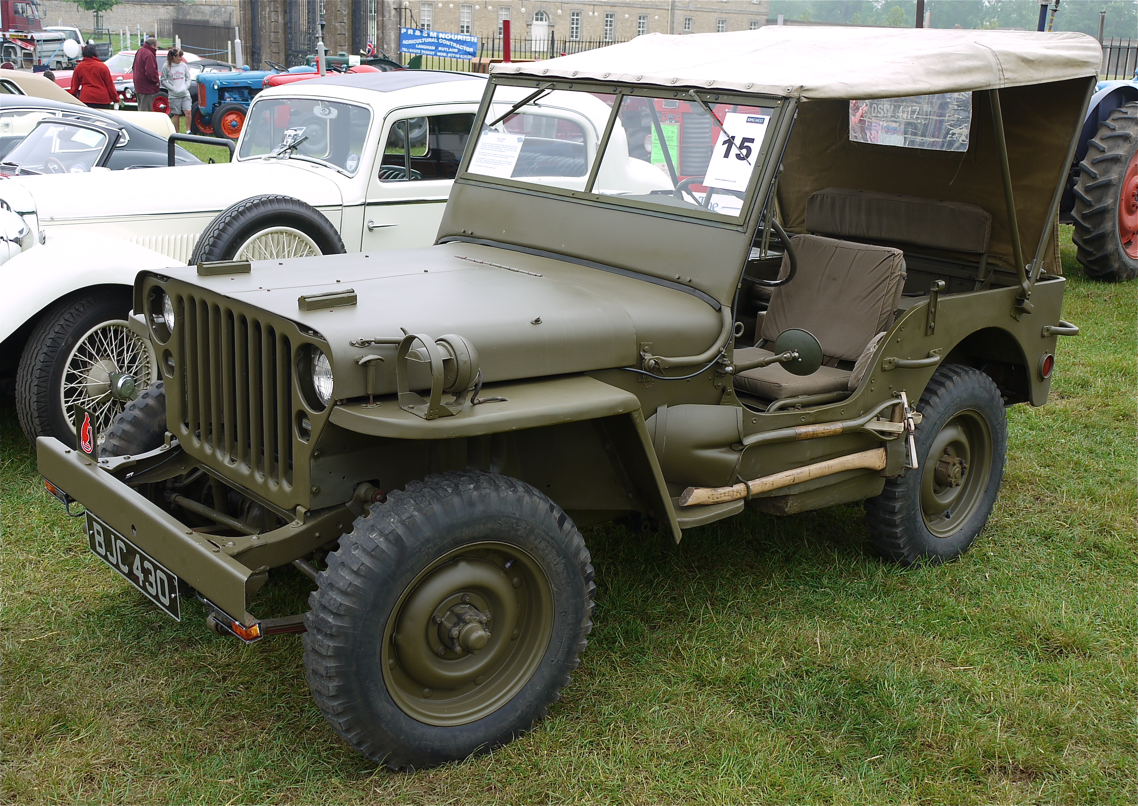 Panasonic G1 14-45 Lens